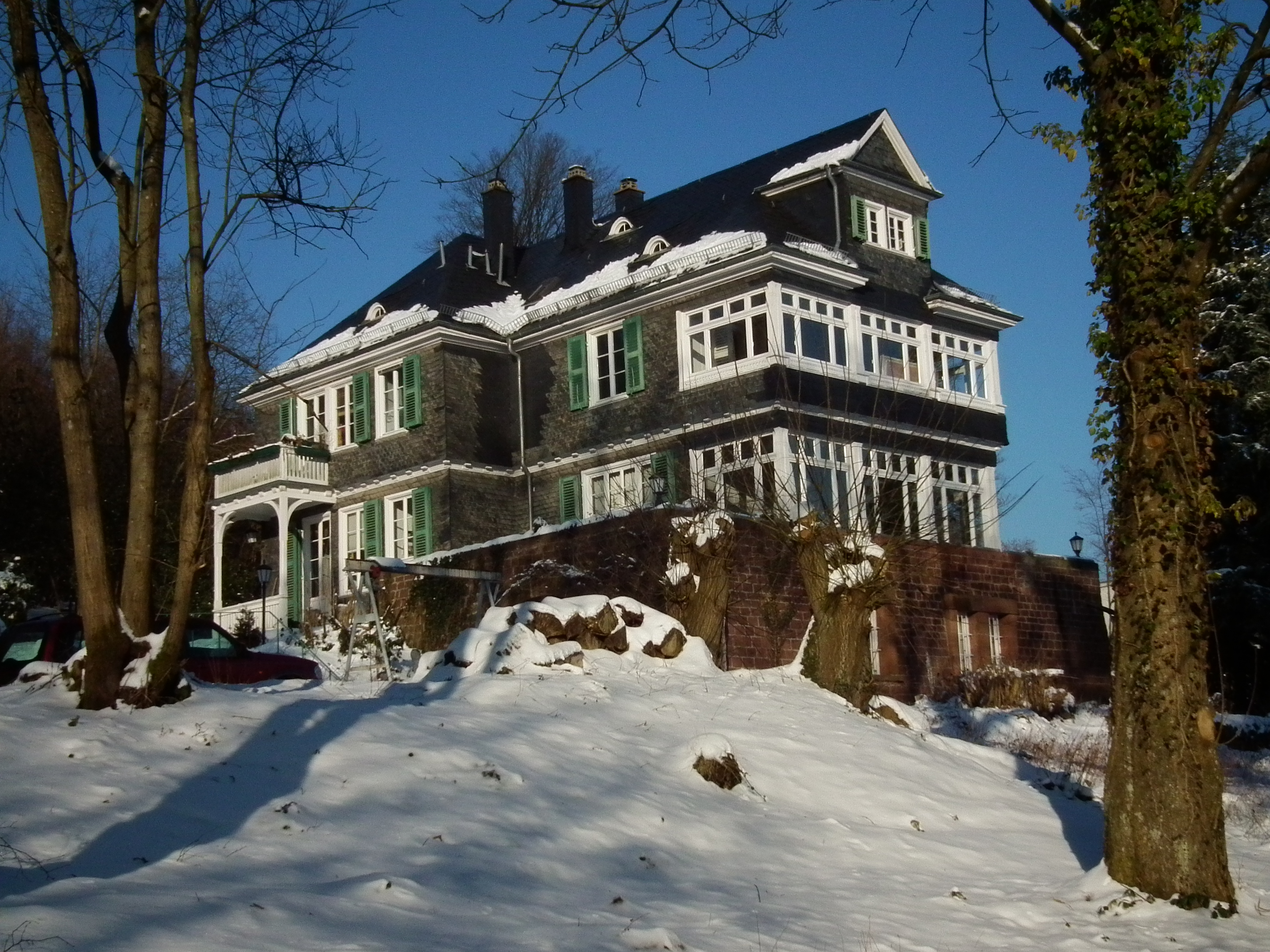 Schiefergedecktes Haus auf dem Kohlhof, früher bekannt als das "Cafe Ehmann" (Baden-Württemberg, Deutschland)